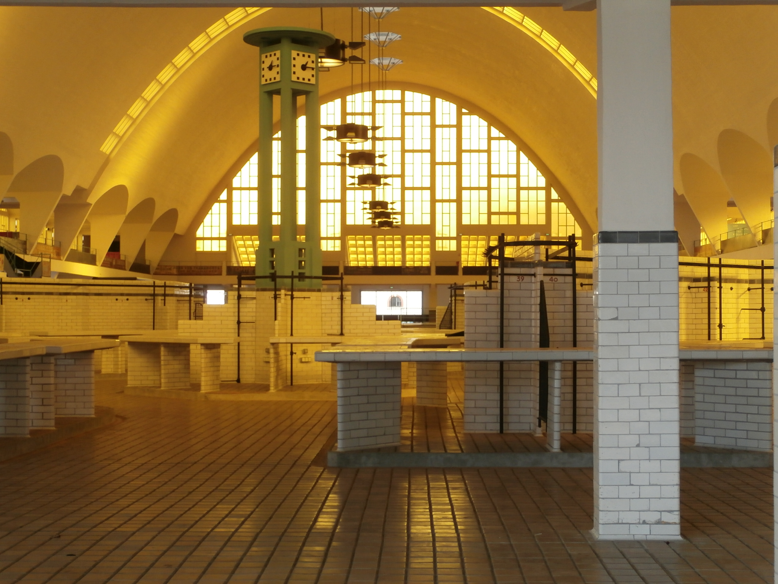 Reims, Rue de Mars Les Halles du Marché Boulingrin Dates de construction : 1927-1929 Architecte : Émile Maigrot Rénovation : 2010-2012